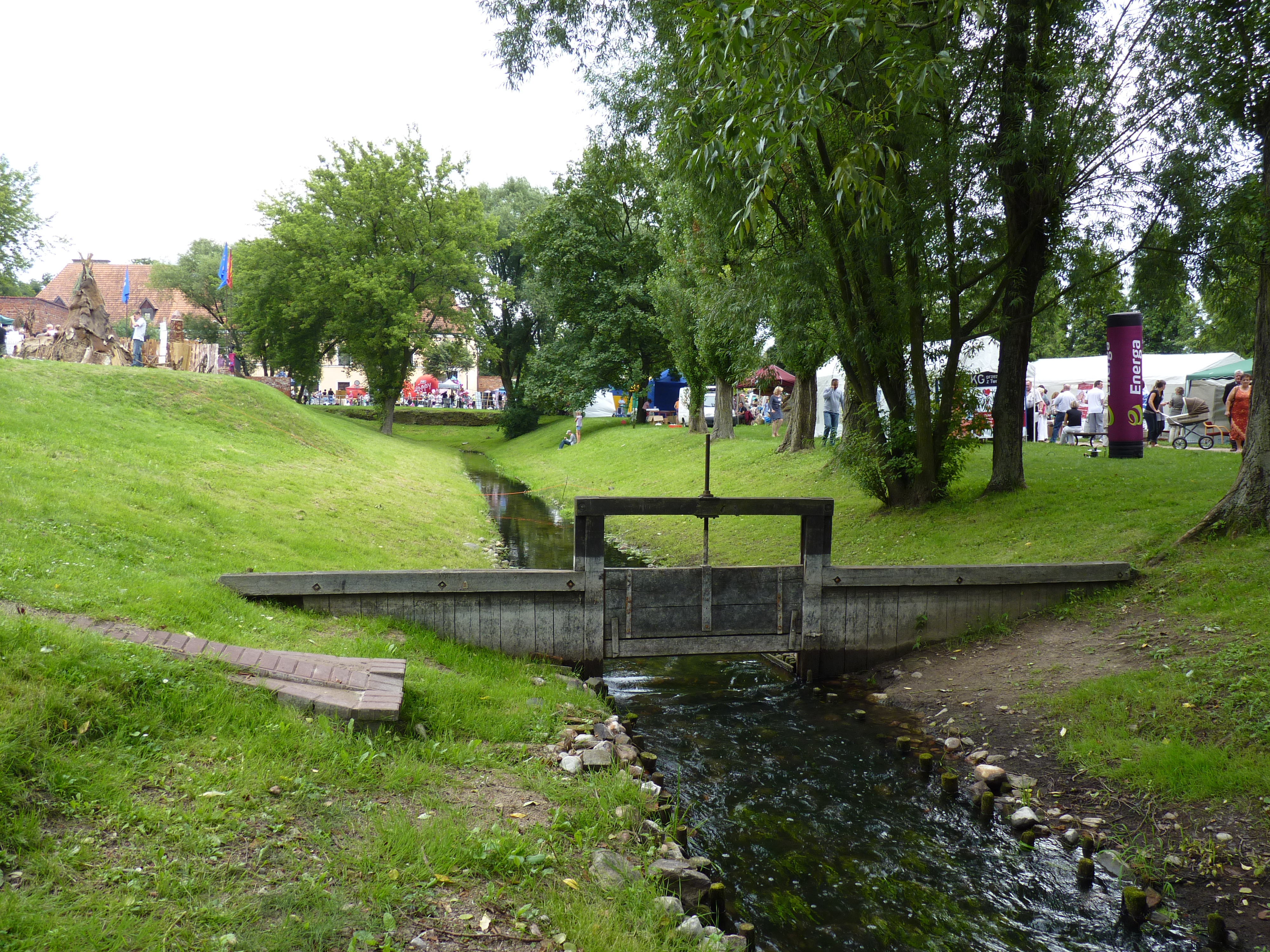 Fosa zamku krzyżackiego w Brodnicy